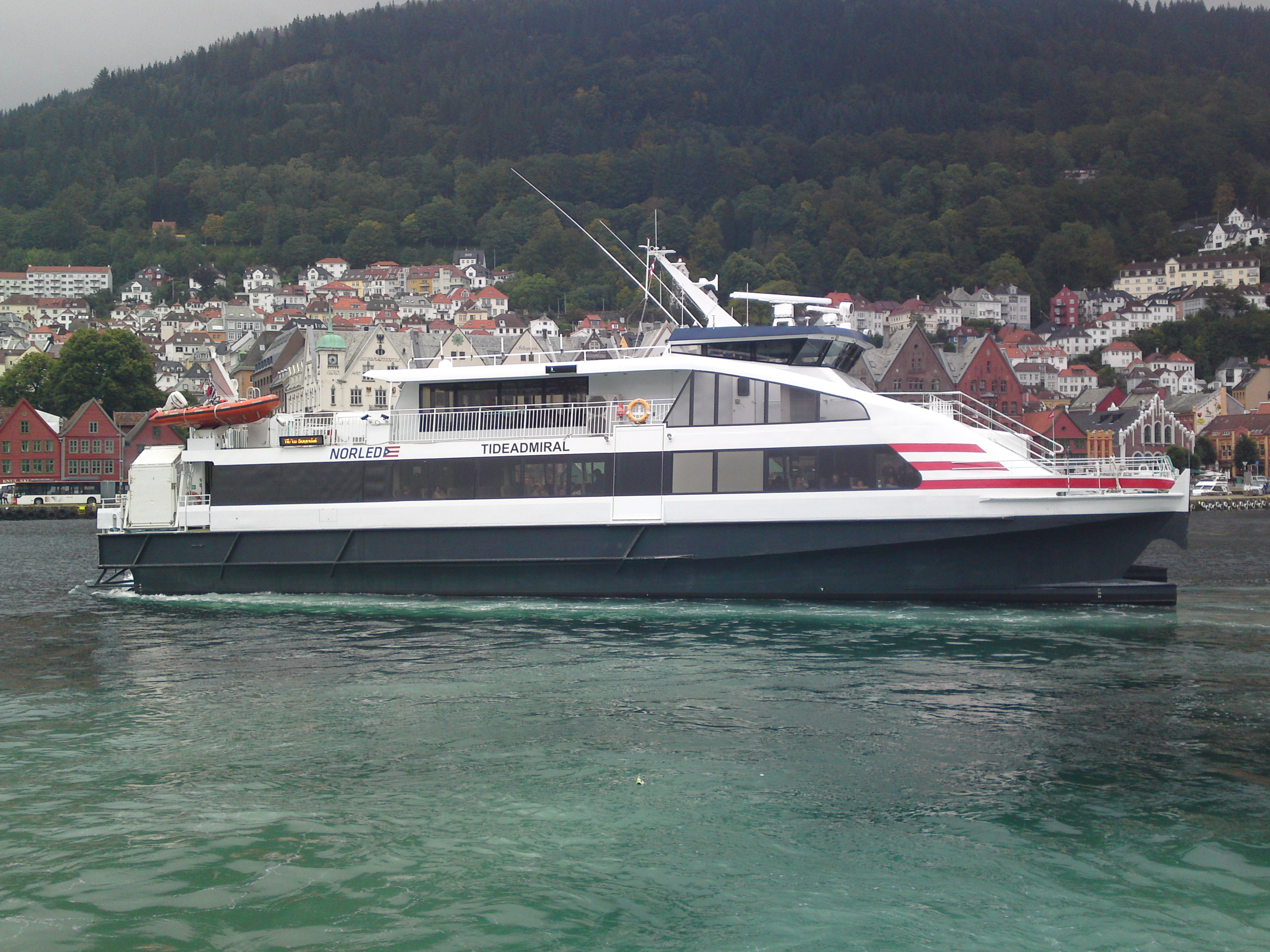 M/S Tideadmiral i Bergen 2012.